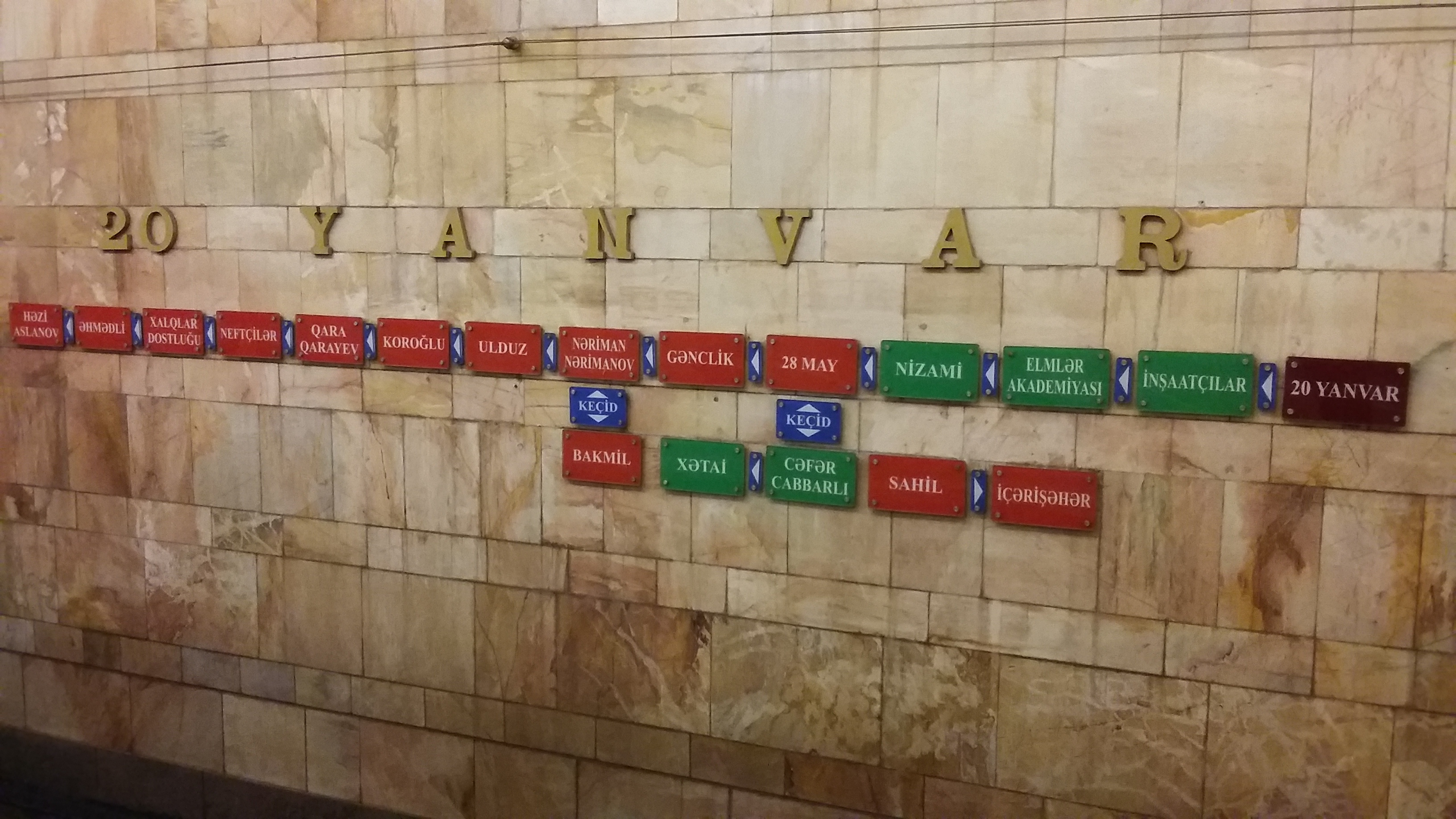 20 yanvar metrostansiyası 2016.03.15